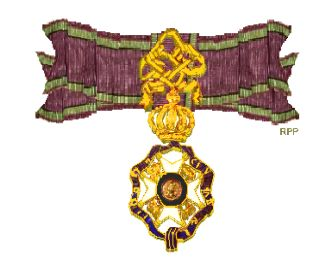 Prinsessenkruis van de Saksen Ernestinische Huisorde